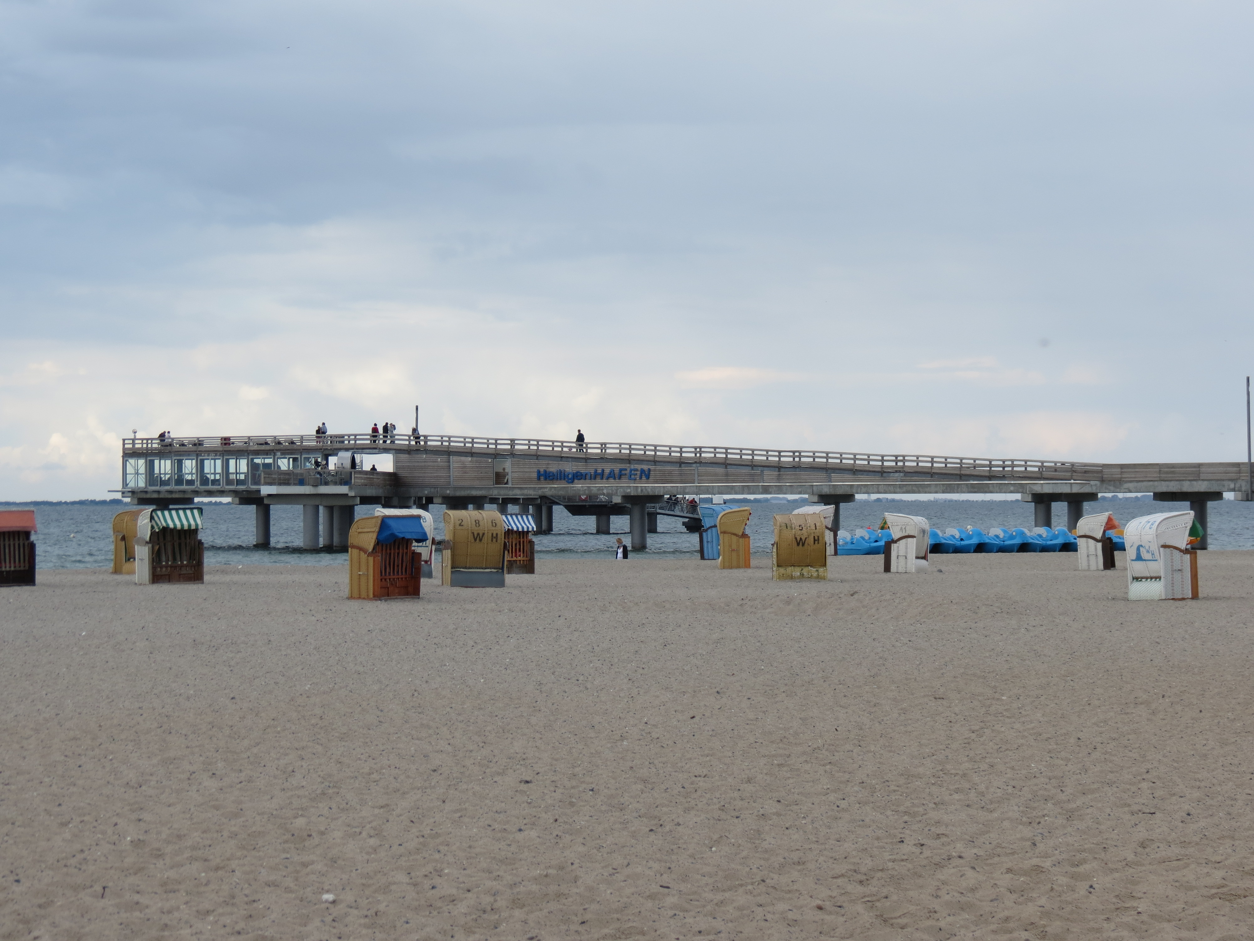 Seebrücke Heiligenhafen (2013)